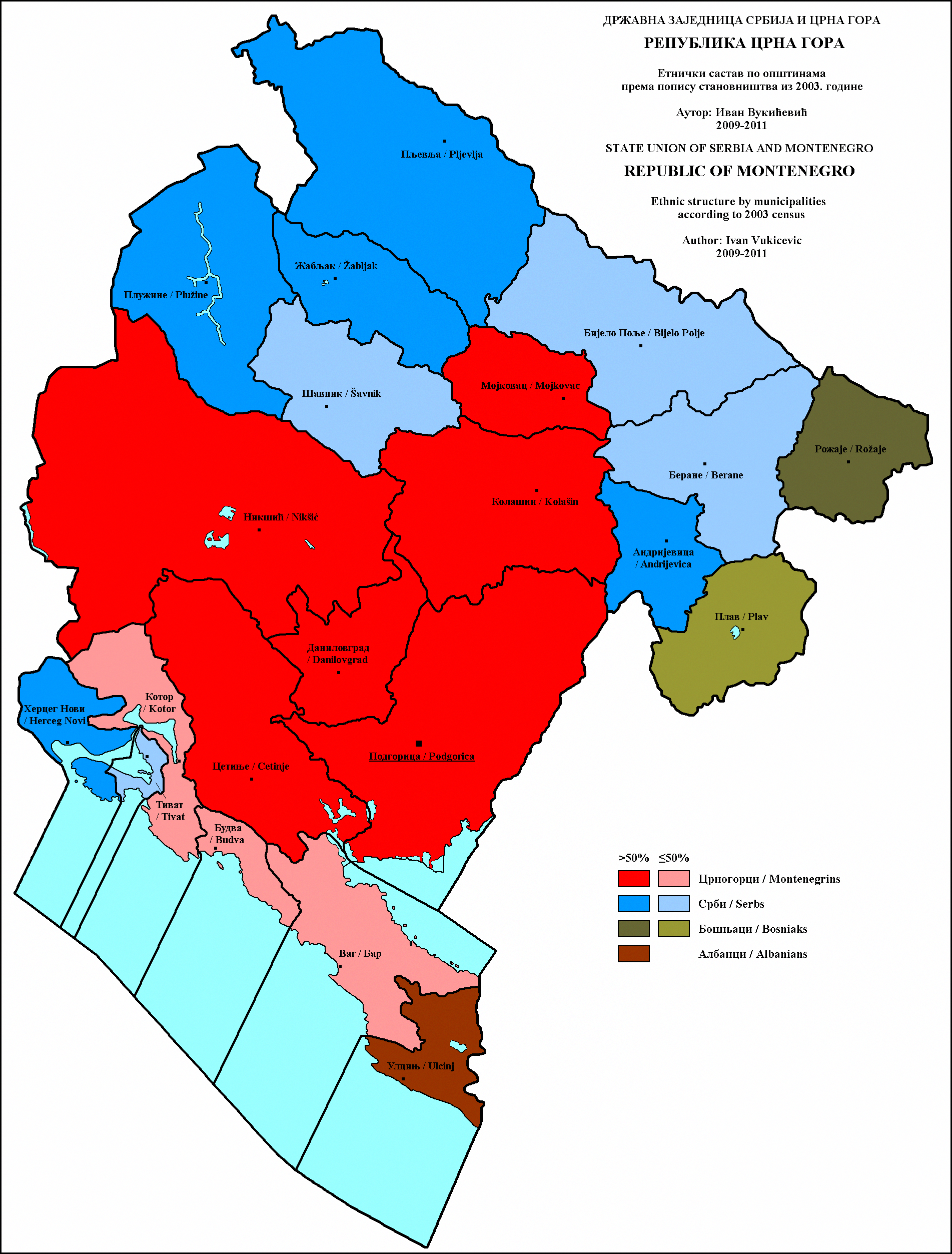 Етнички састав Црне Горе по општинама 2003. године. Аутор: Иван Вукићевић